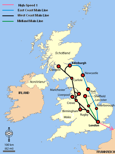 Einfache Ubersichtskarte der WCML, ECML, Midland Minline und CTRL.